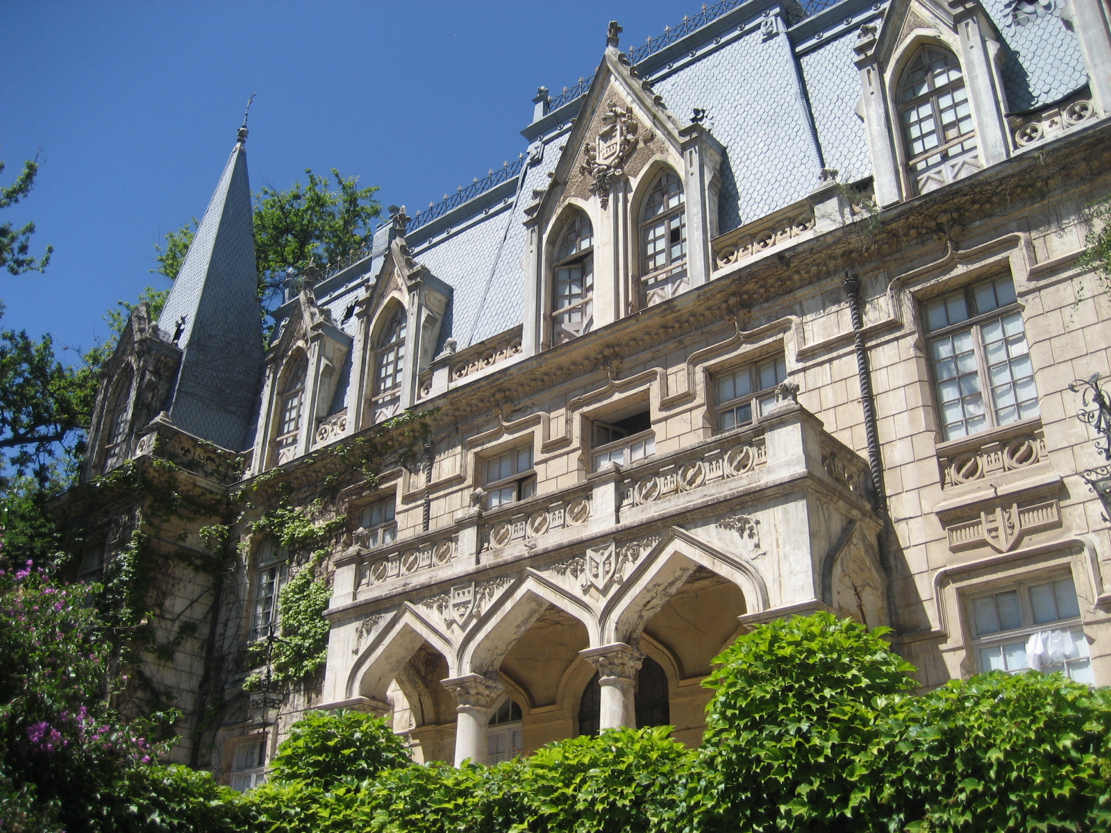 Castillo de las Majadas, Comuna de Pirque, Región Metropolitana de Santiago, Chile.